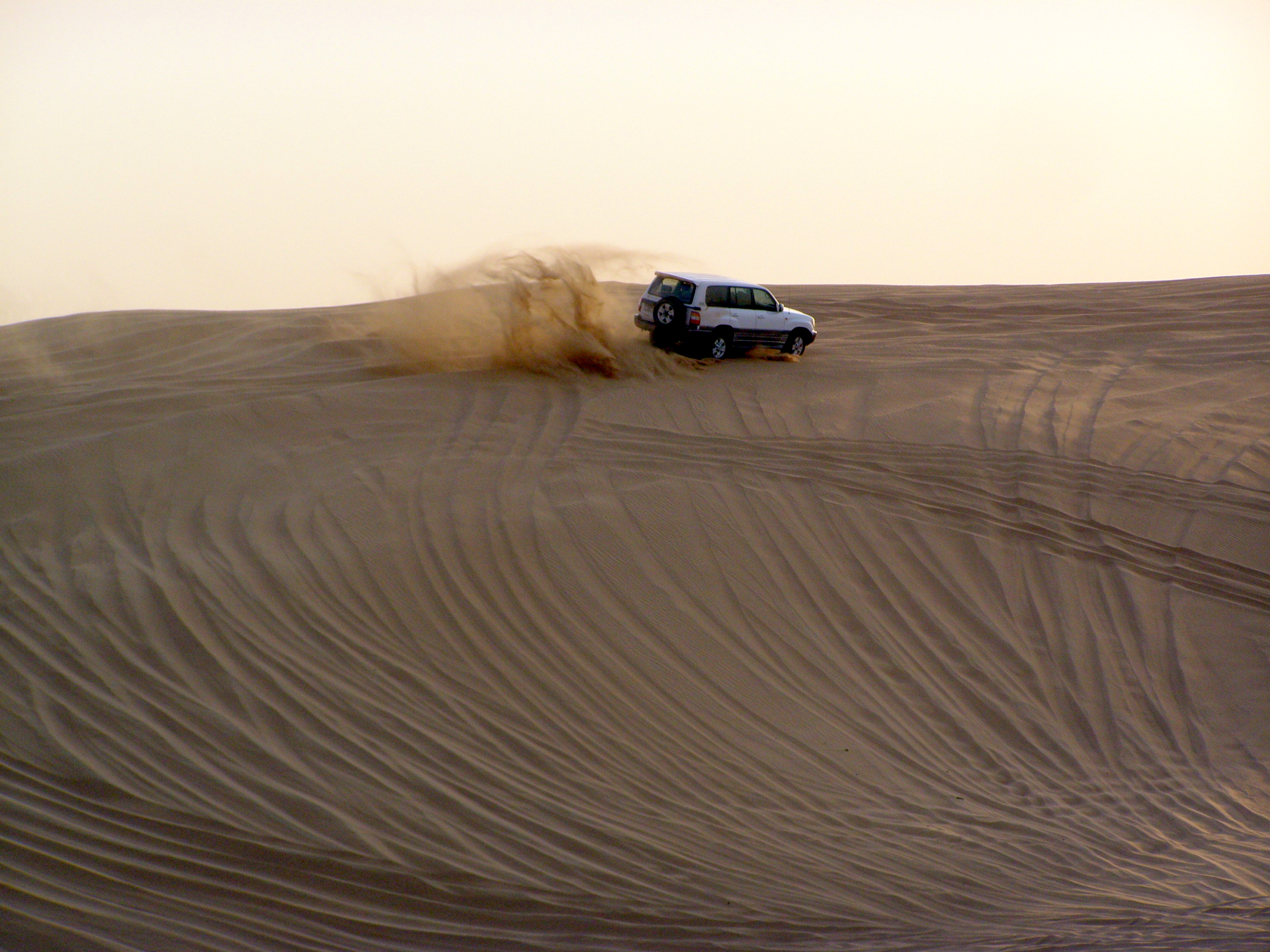 Dune Bashing - Dubai